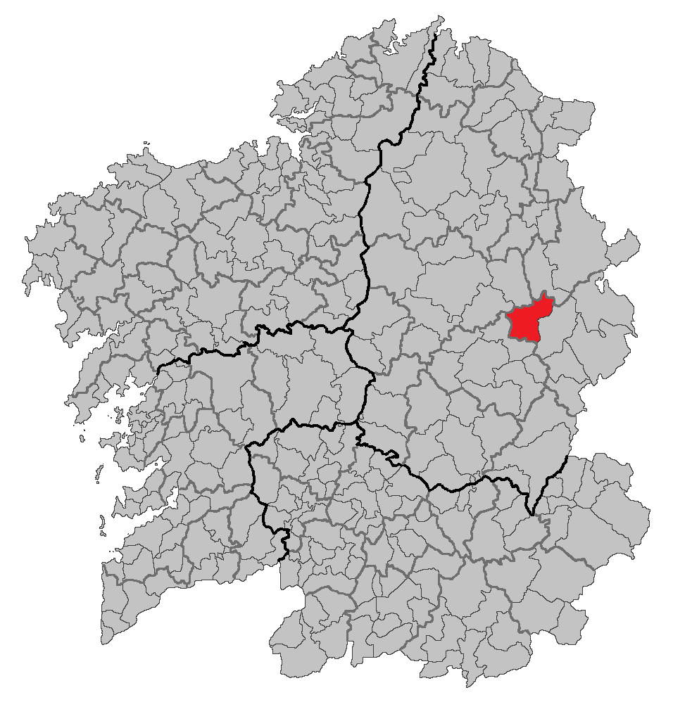 Mapa coa localización do concello de Baralla.